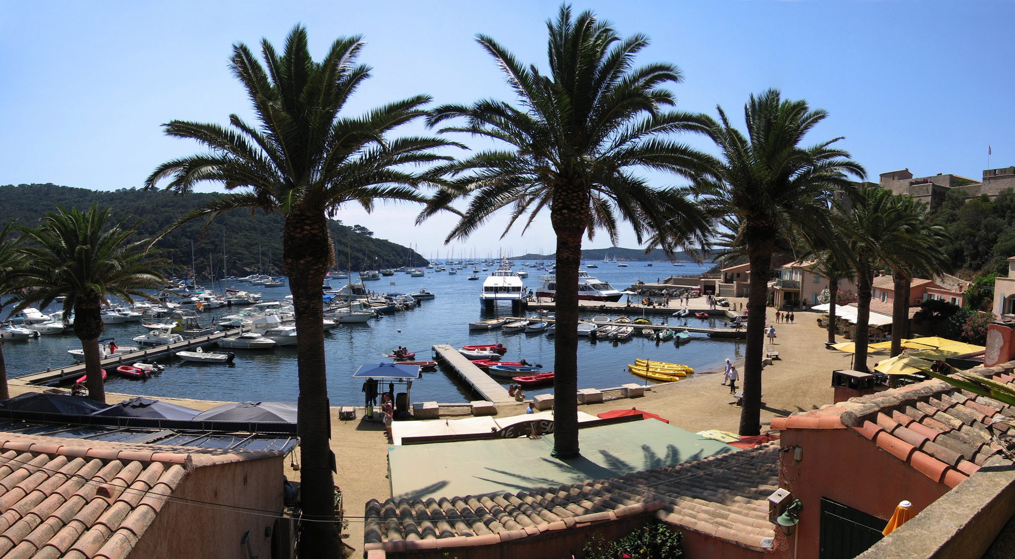 Rade du Port Cros